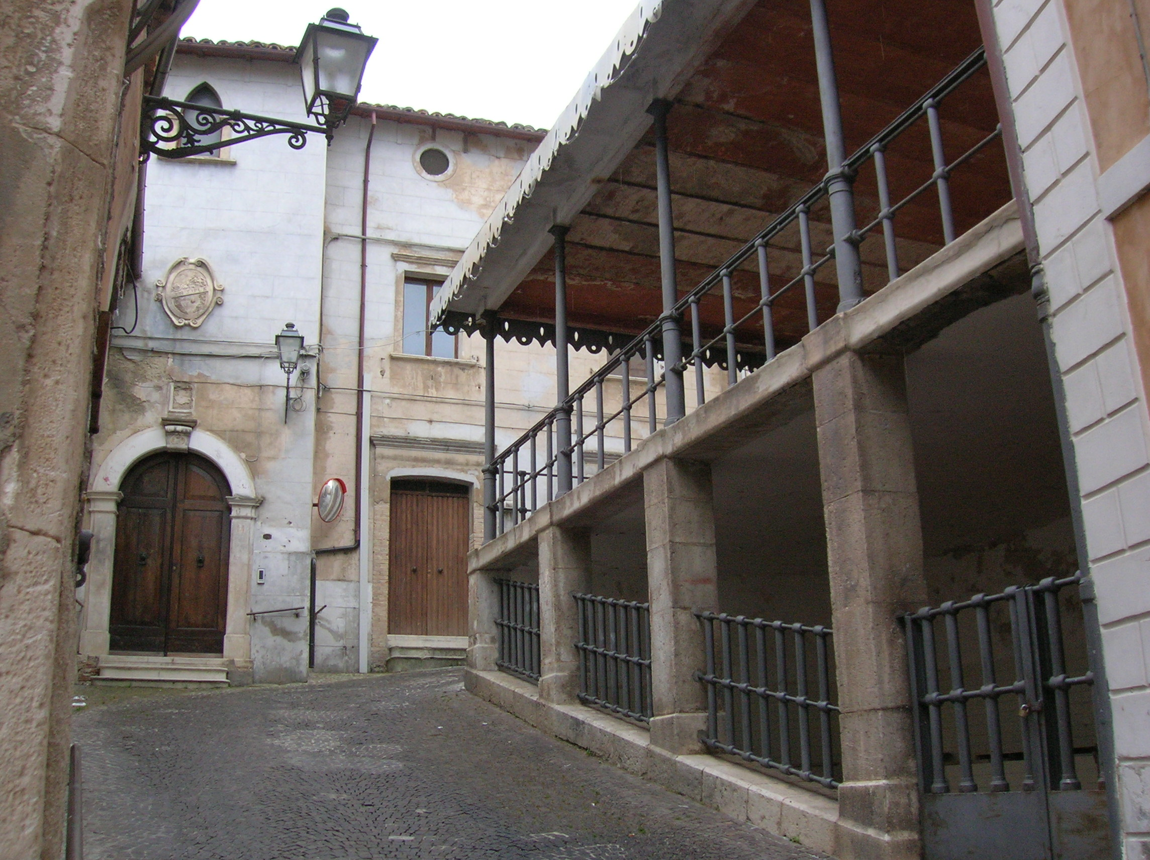 Isola del Gran Sasso d'Italia mattatoio